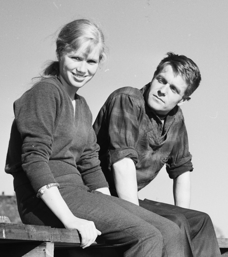 Liv Ullmann og forloveden Hugo Frank Wathne.